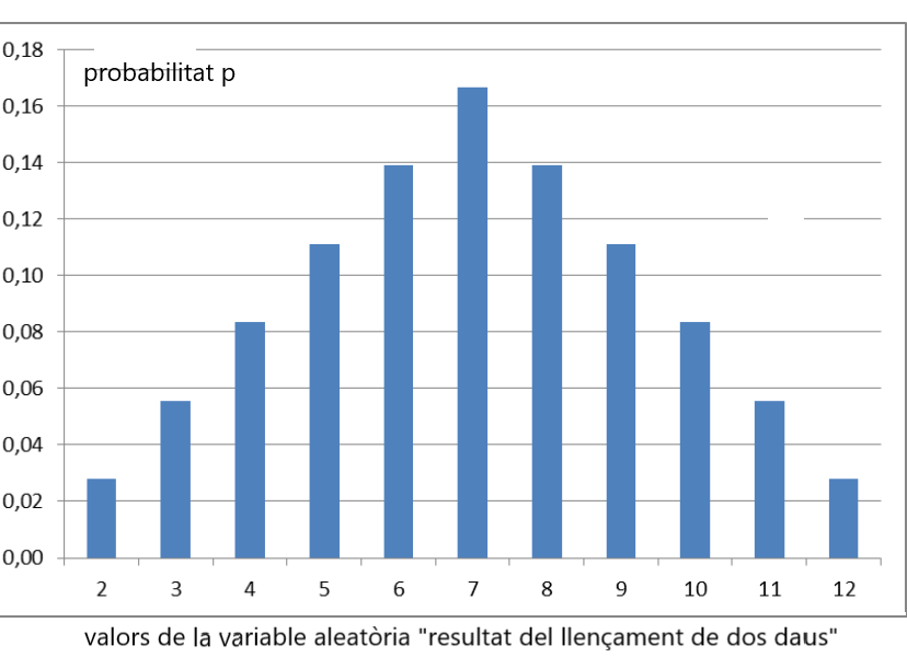 Distribució de probabilitat de l'esperiència aleatòria "suma de punts del llençament de dos daus"